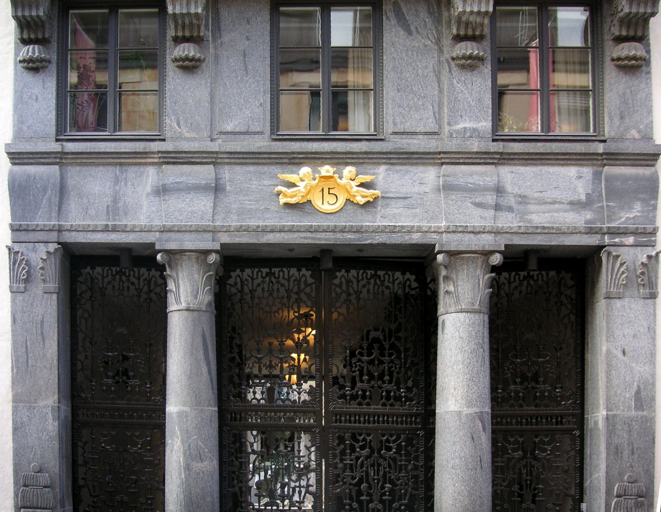 Tändstickspalatsets entré i Stockholm, portikens smidesgrindar är ritade av Gustaf Ivar Cederwall och Robert Hult.